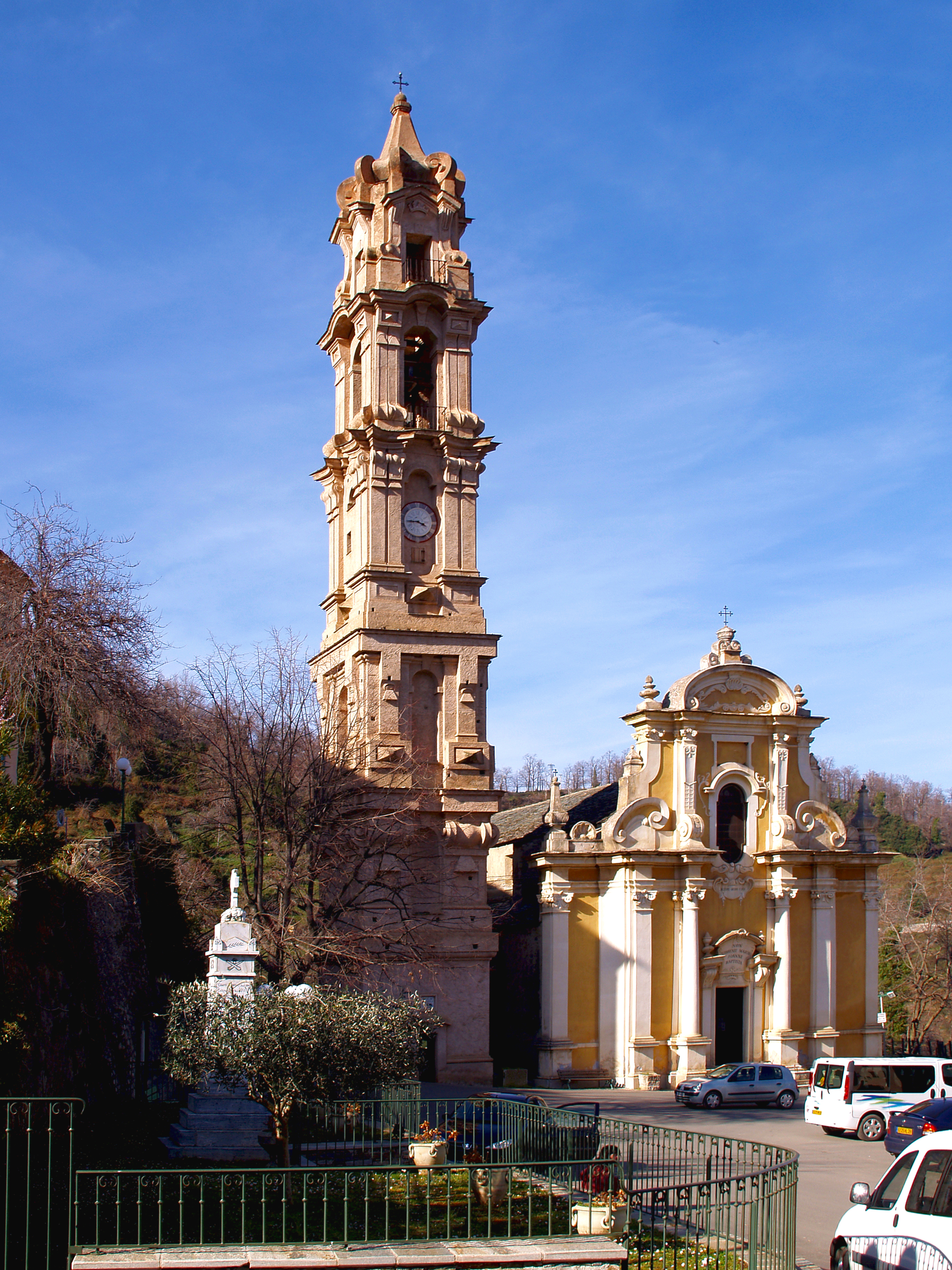 La Porta - Eglise Saint-Jean-Baptiste